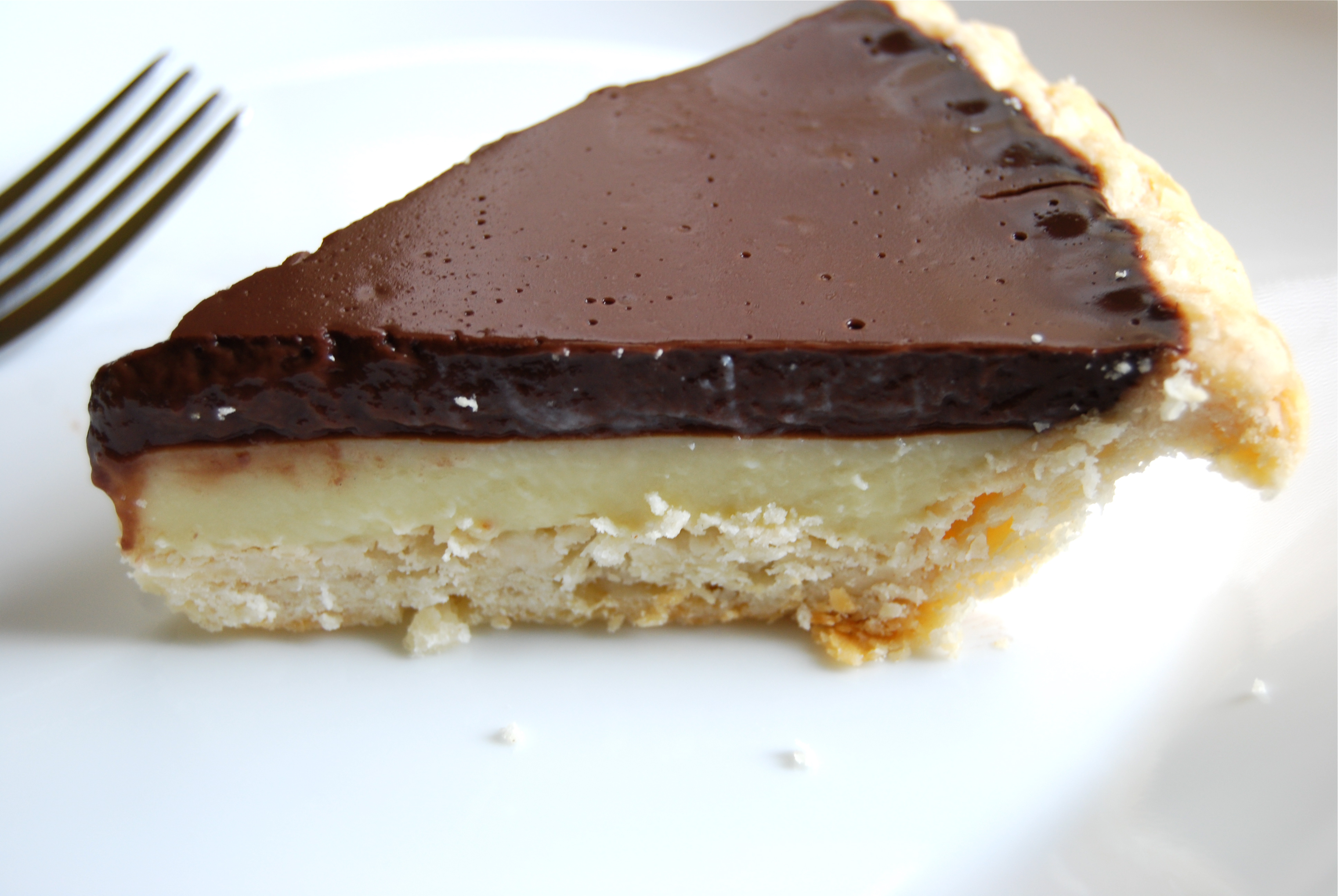 sunny side cafe choco cream pie